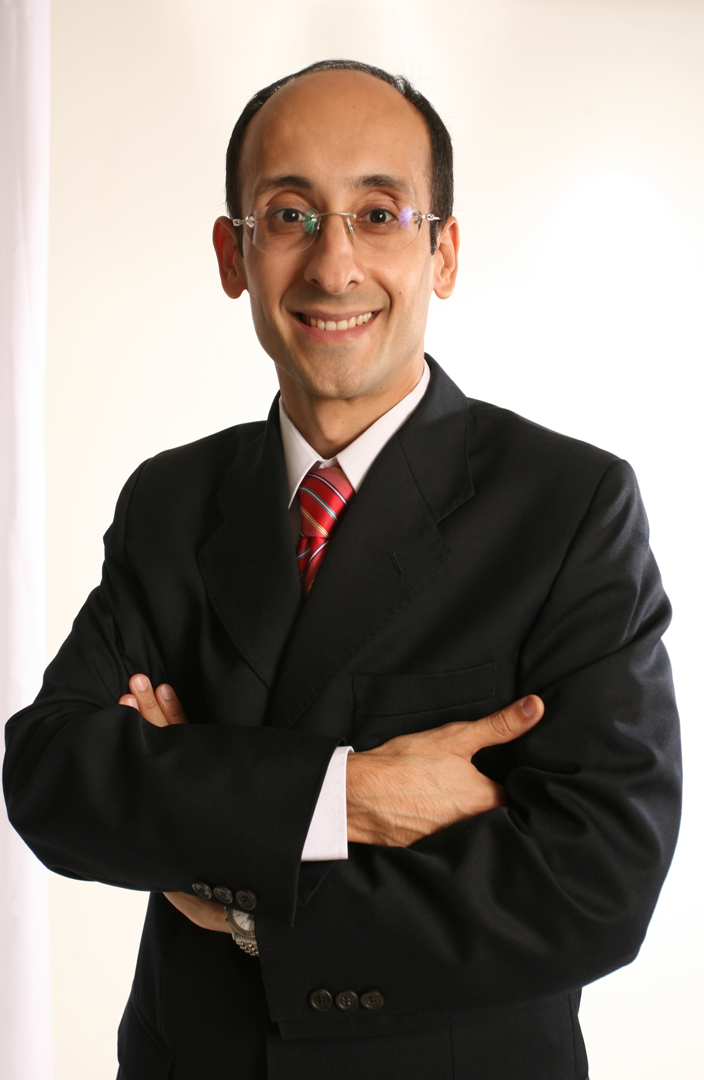 Diego Delgrossi en 2009.